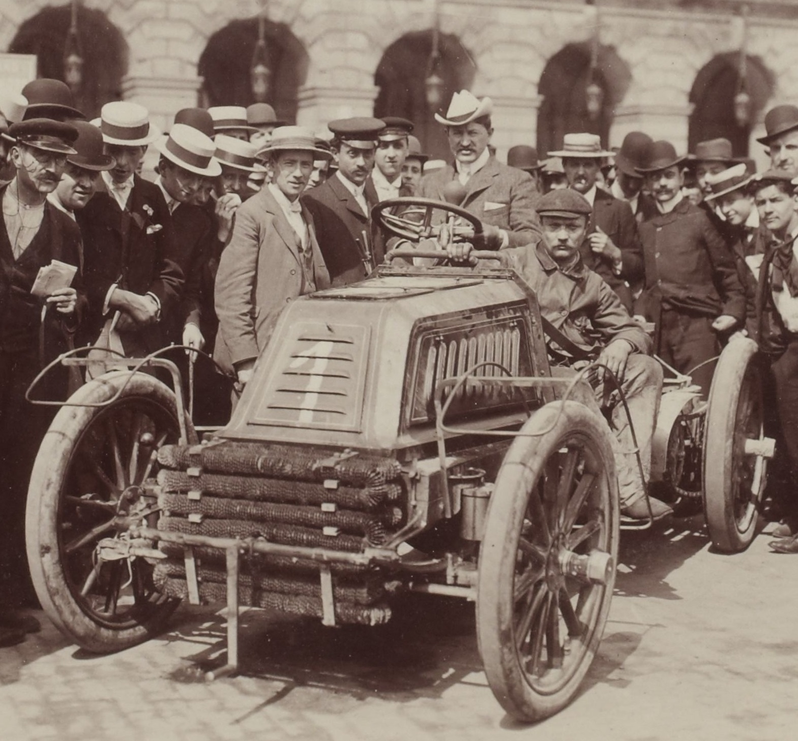 [Collection Jules Beau. Photographie sportive] : T. 18. Année 1902 / Jules Beau : F. 19v. [Paris - Vienne, épreuve de vitesse]